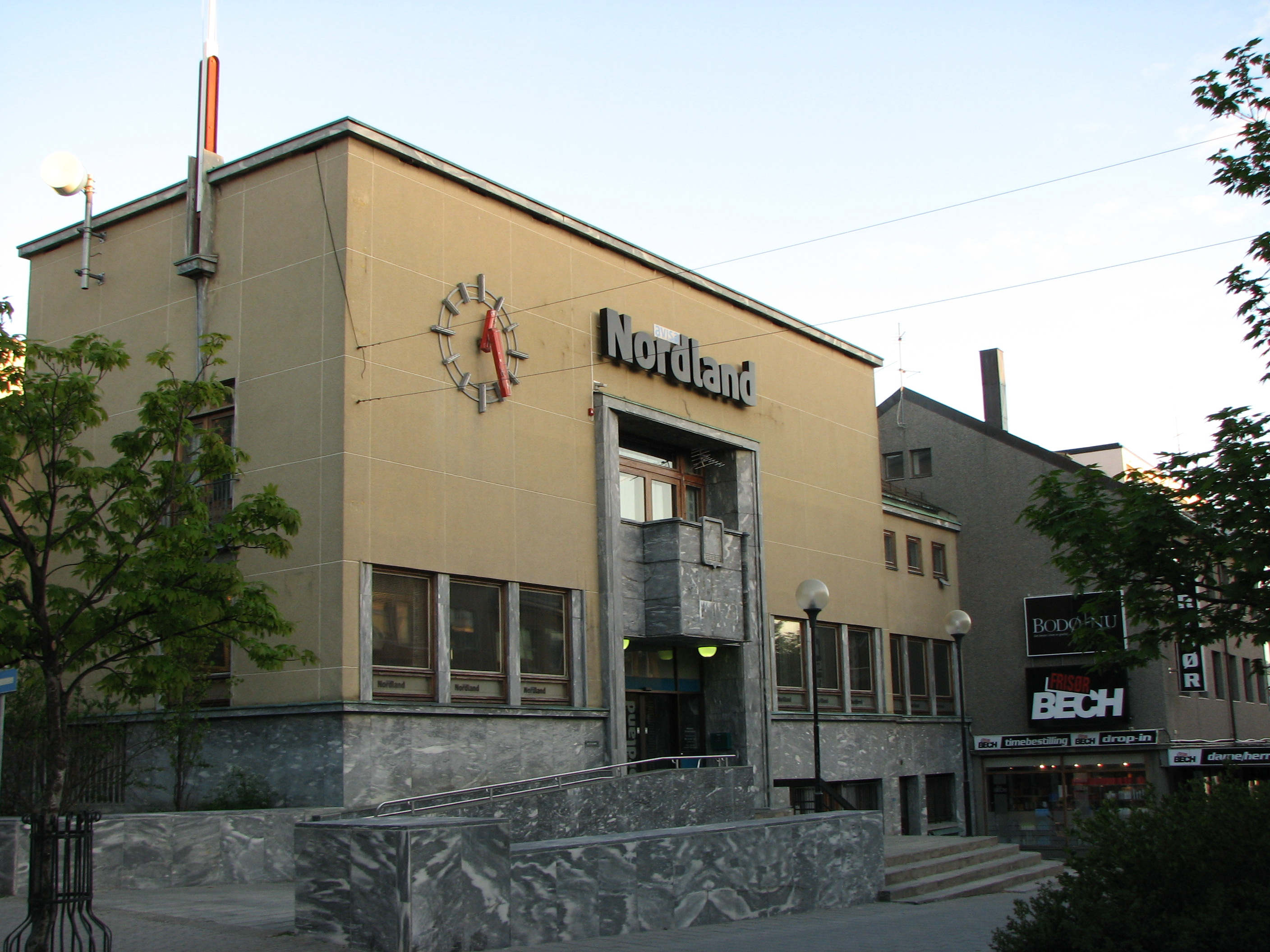 Storgata 38, Bodø, Avisa Nordlands kontorer, tidligere kontorer til Nordlandsbanken